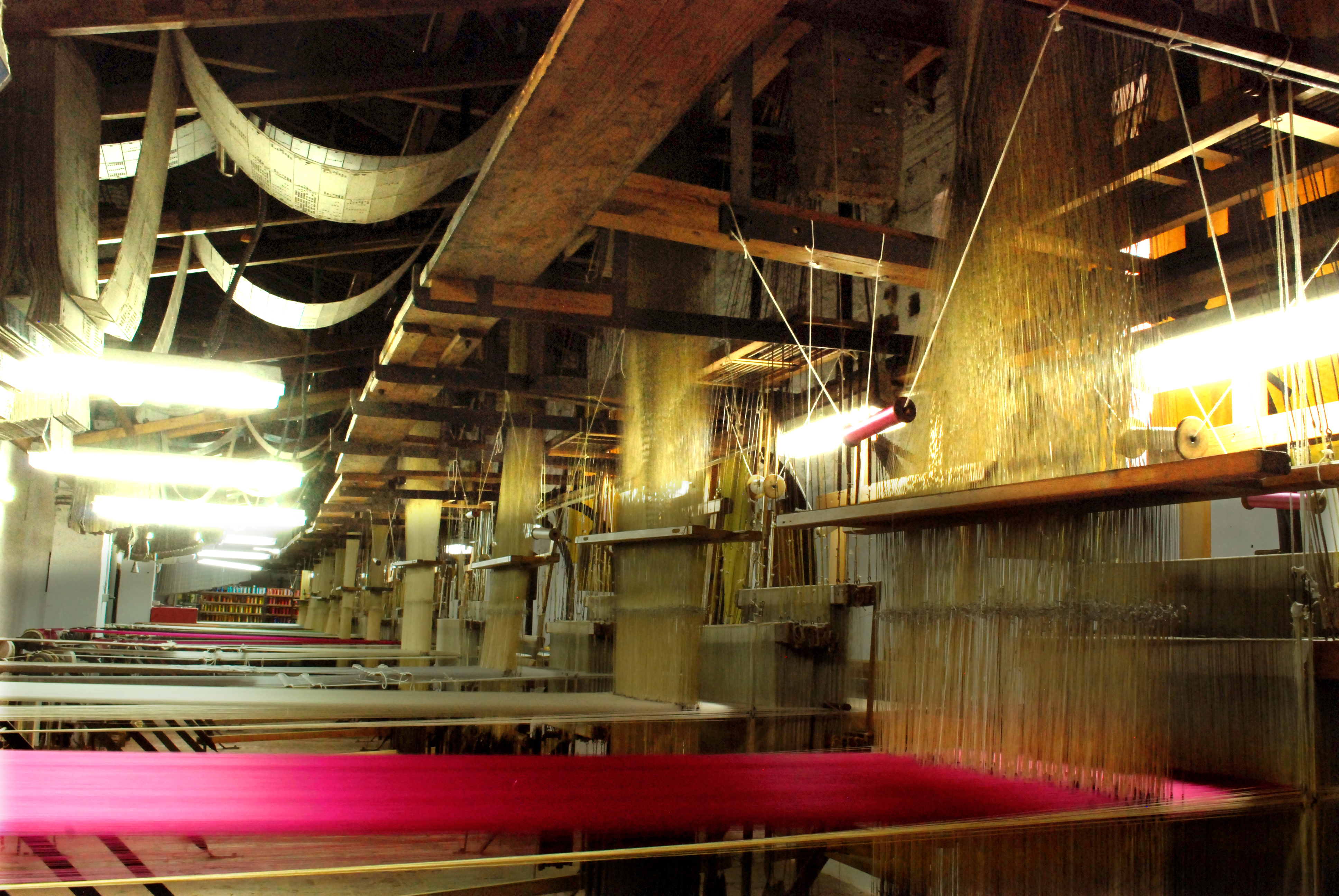 Once telares Jacquard del futuro Museu de la Seda de Moncada